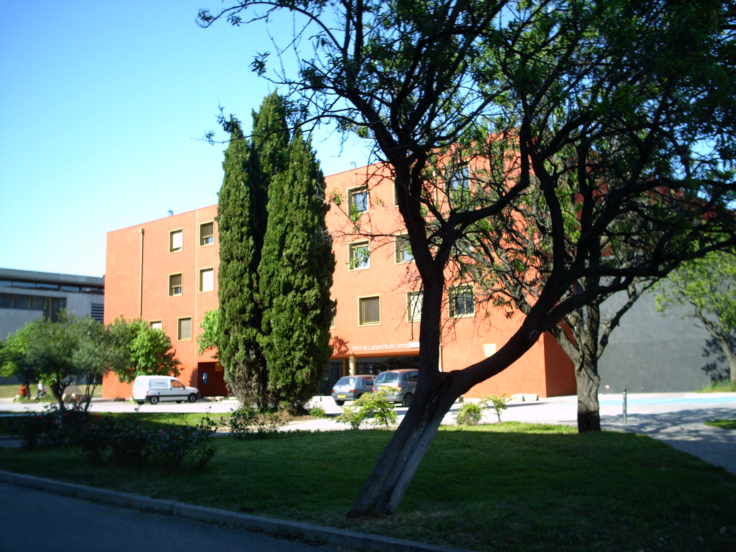 Bâtiment du théâtre de l'Université Paul Valéry (Montpellier)